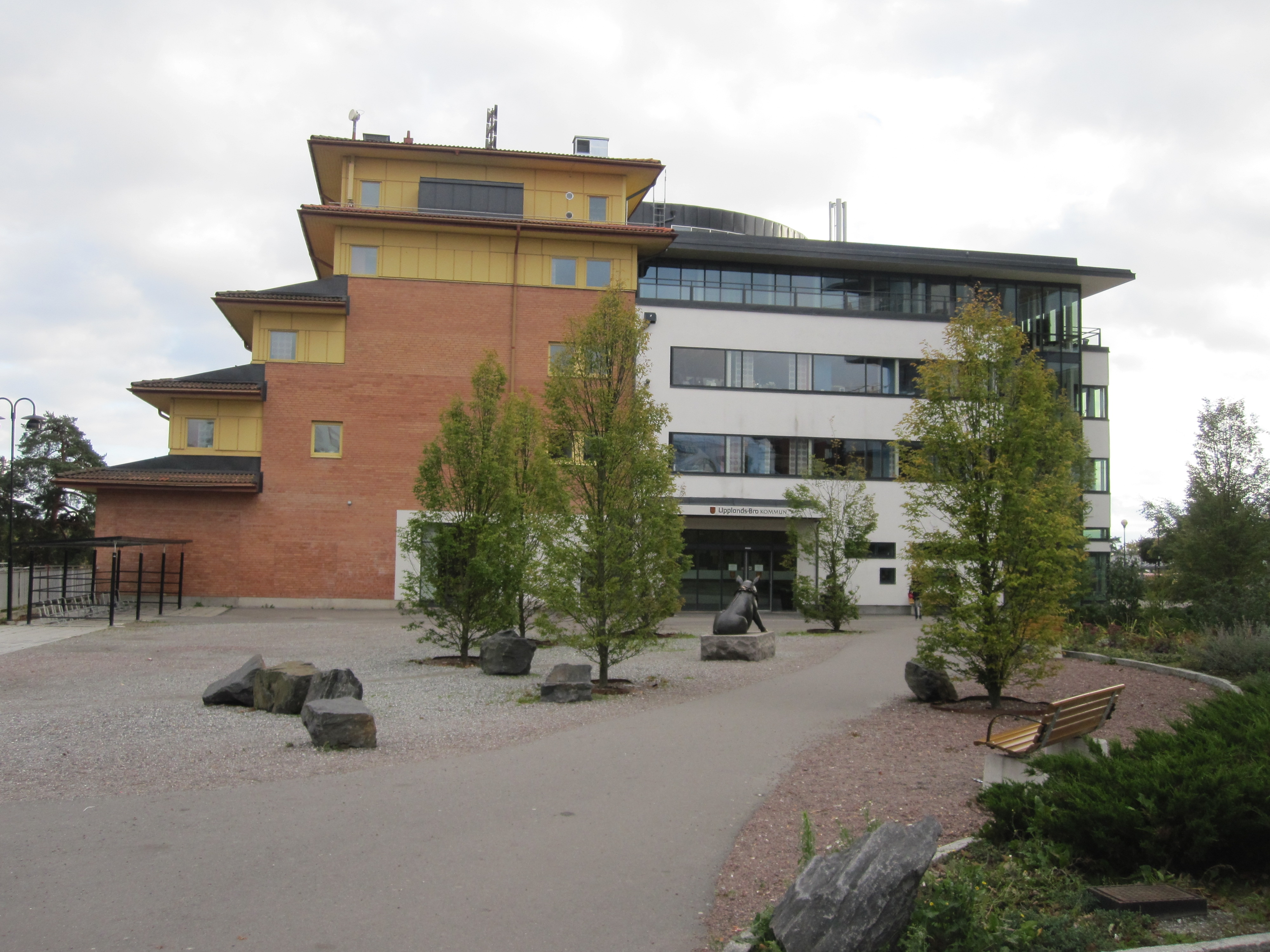 Bilden föreställer kommunhuset, (Furuhällshuset), i Kungsängen, i Upplands-Bro kommun